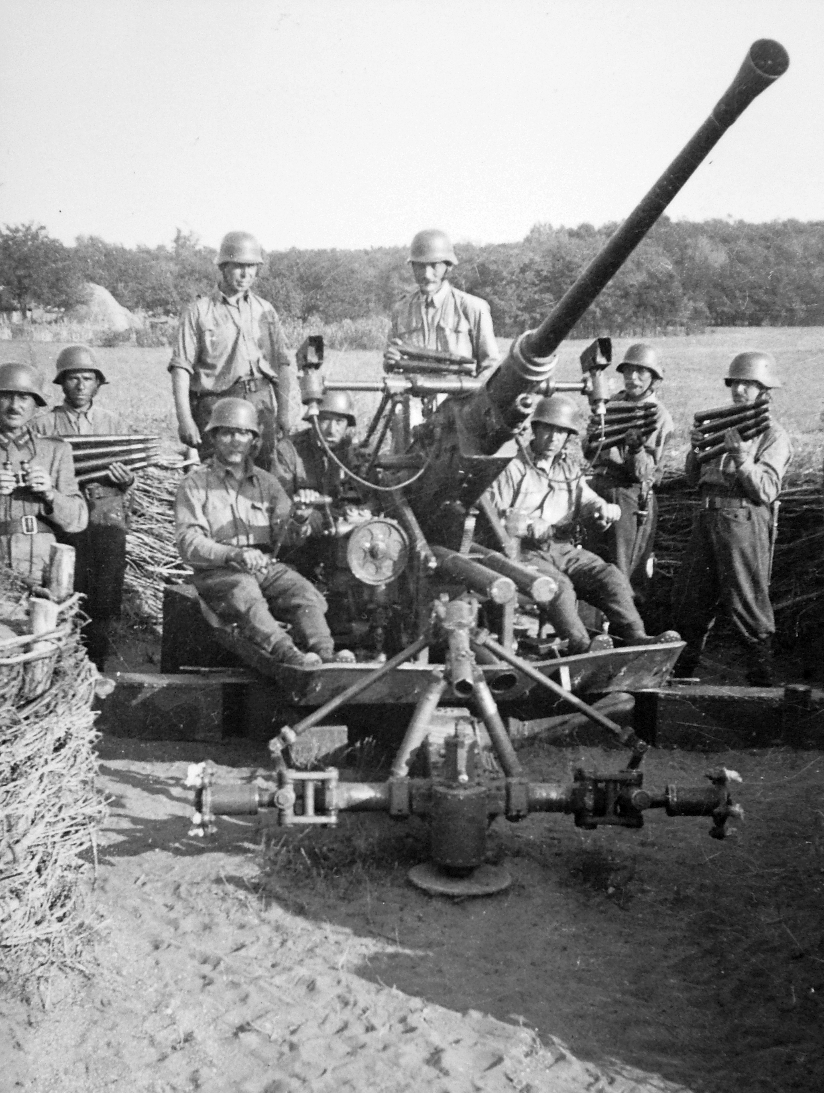 Bofors 36M 40 mm-es légvédelmi gépágyú. Location: Hungary Tags: second World War, helmet Title: Bofors 36M 40 mm-es légvédelmi gépágyú.